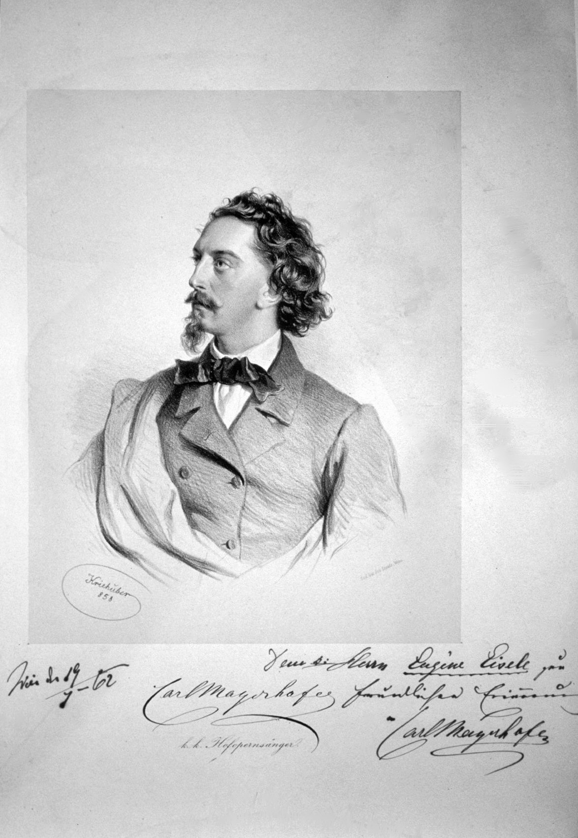 Karl Mayerhofer (1828-1913), österreichischer Opernsänger, Bassbuffo Lithographie von Josef Kriehuber, 1858